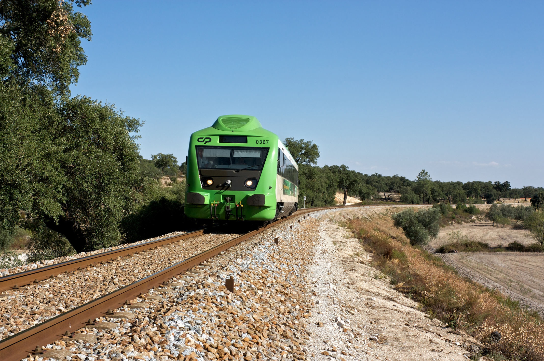 Tipo: Comboio Regional 5502 [Elvas - Entroncamento] Local: Vale da Bica [Linha do Leste, PK 158] Data e hora: 15 de Setembro de 2009 [16h35] Material: Automotora 0367 [Unidade Simples Diesel - Allan Renovada]